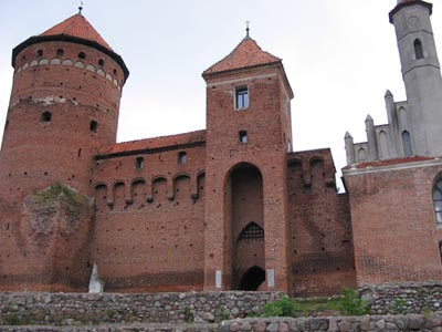 Widok z przodu.